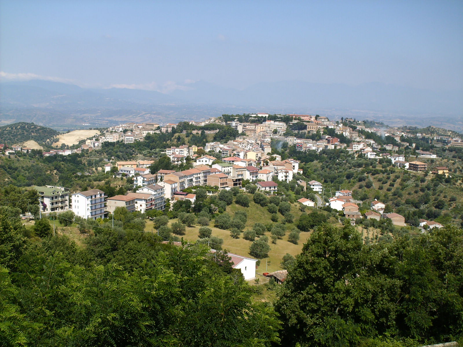 foto mie